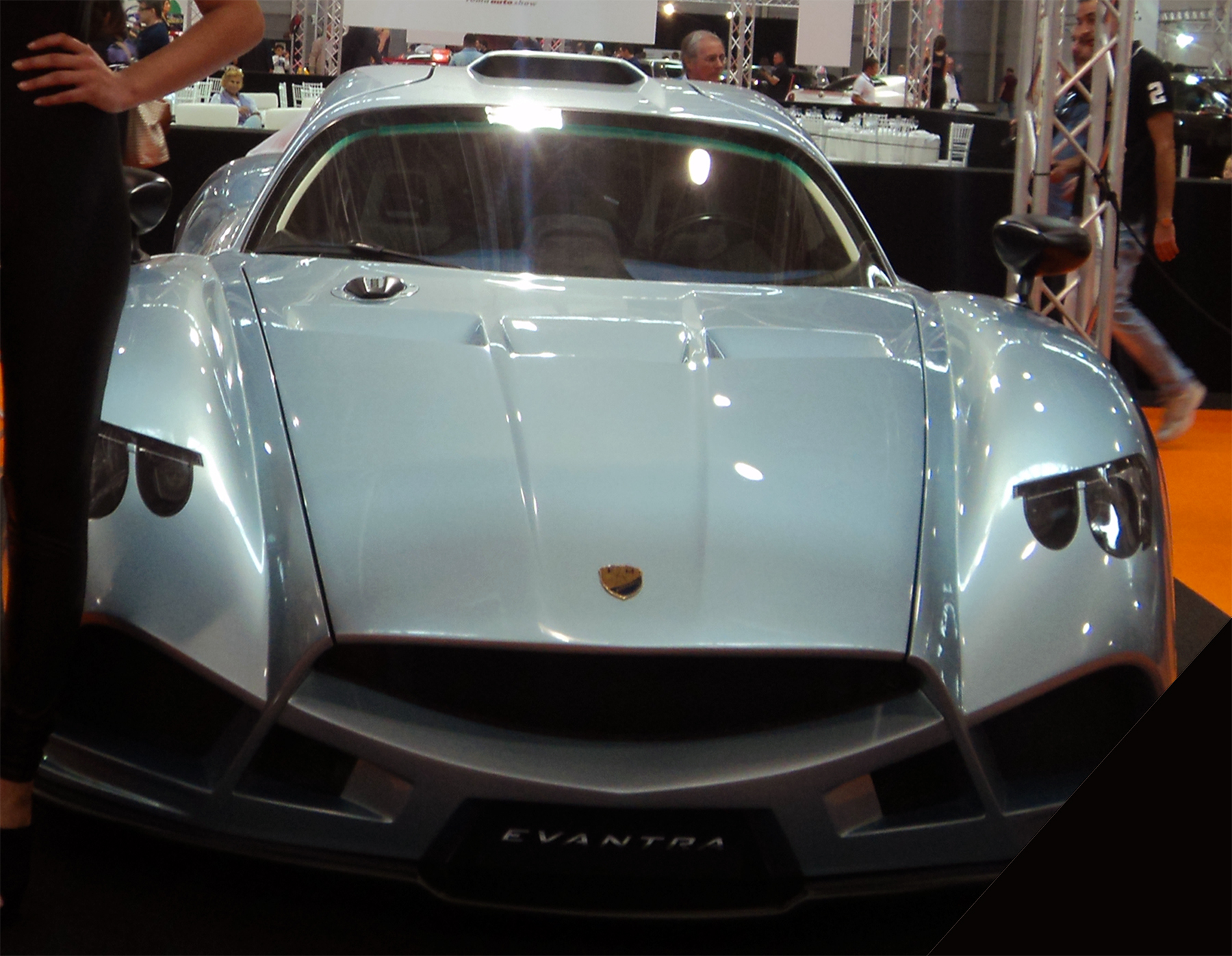 La vista frontale di una Mazzanti Evantra